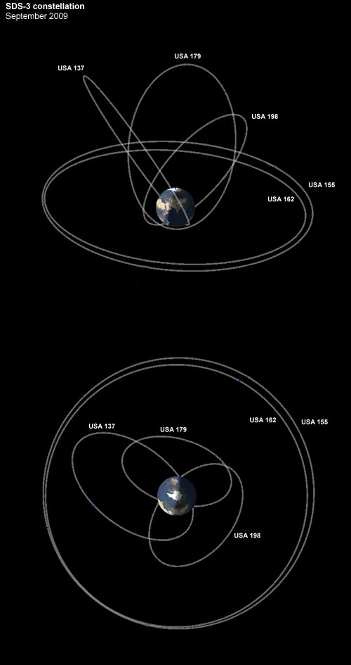 SDS-3 satellite constellation